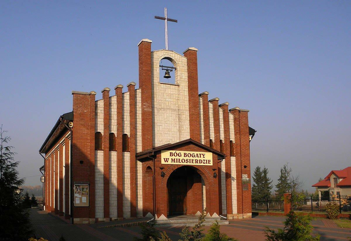 Kościół parafialny w Janiszewie.